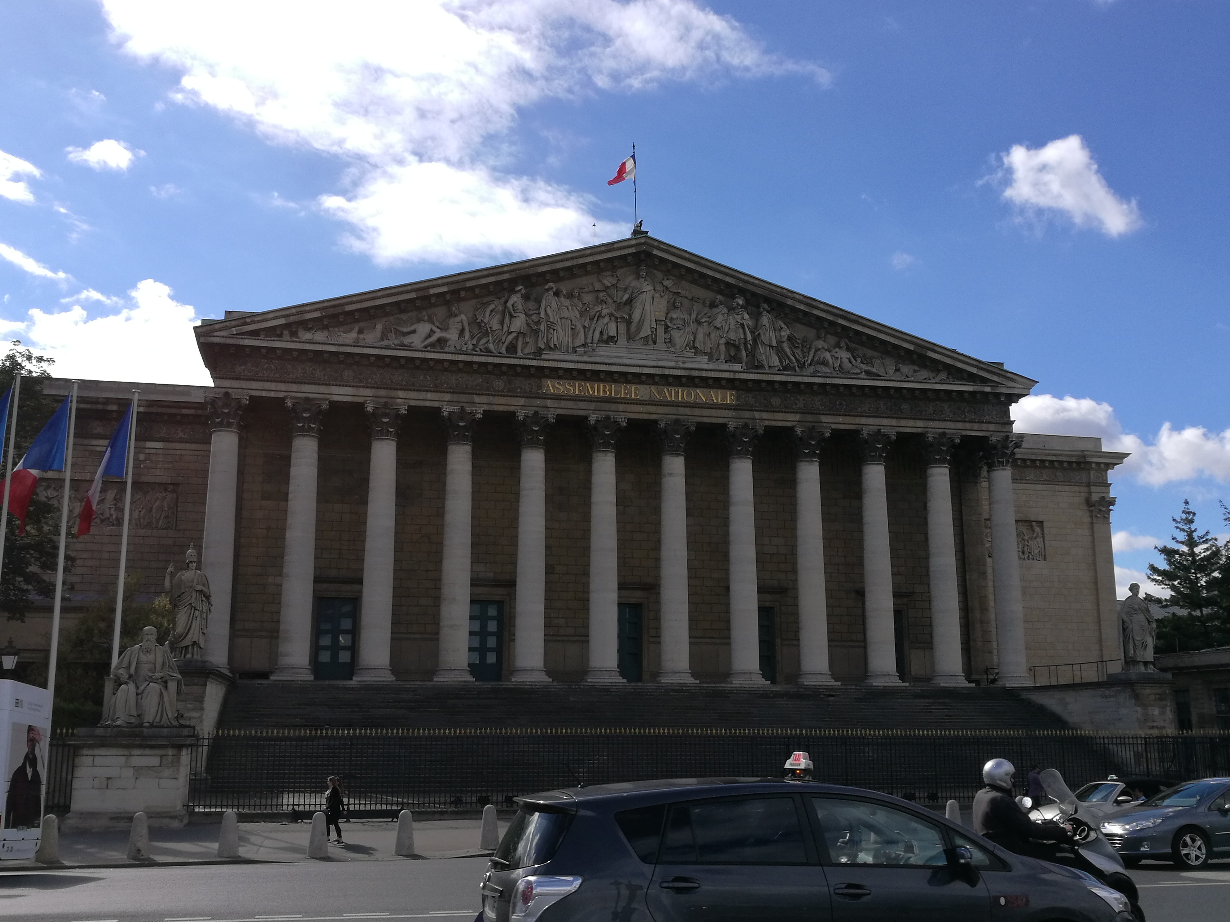 Assemble_Nationale_Paris